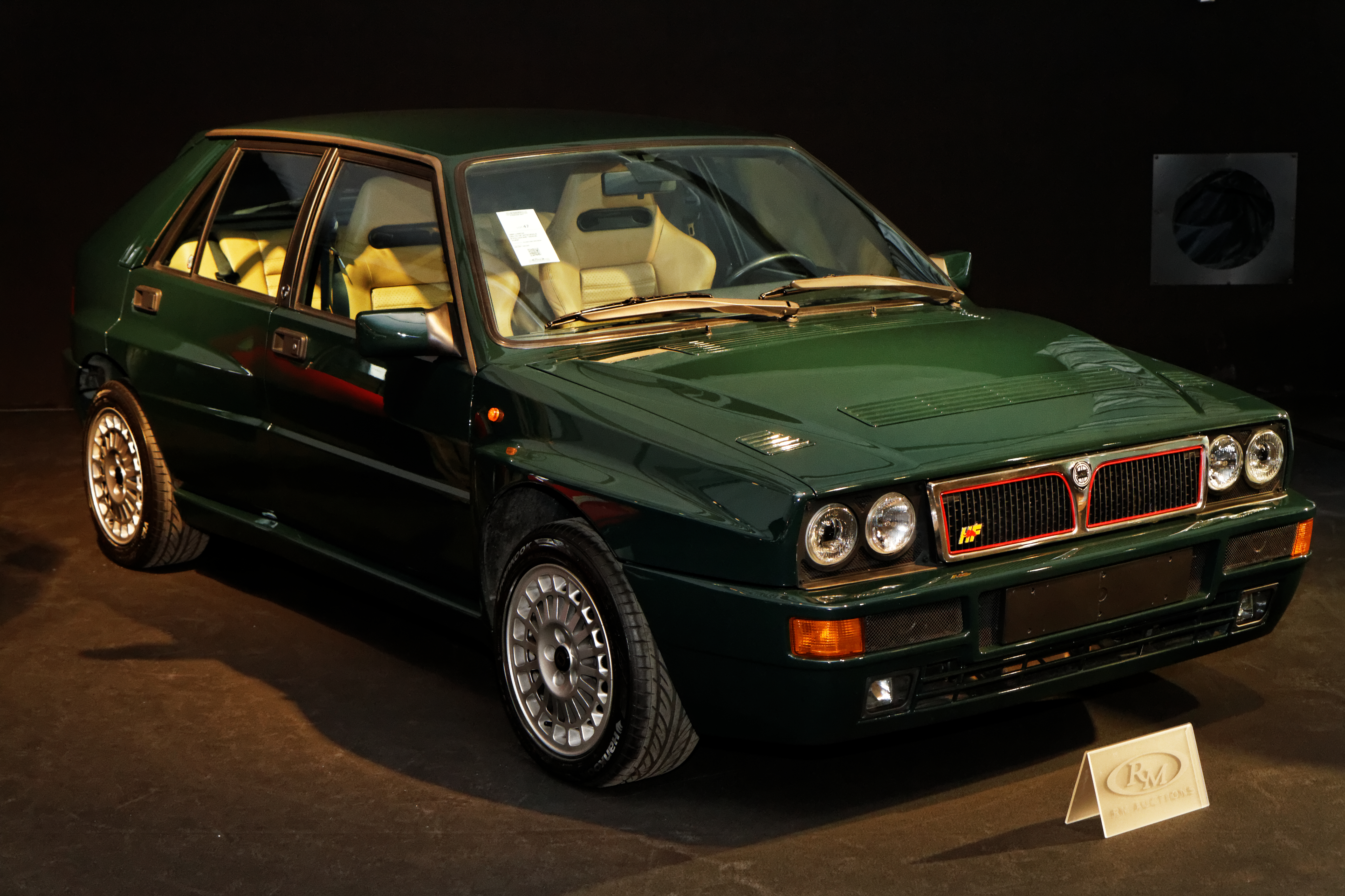 Une Lancia Delta HF Integrale Evoluzione 'Verde York' de 1992.